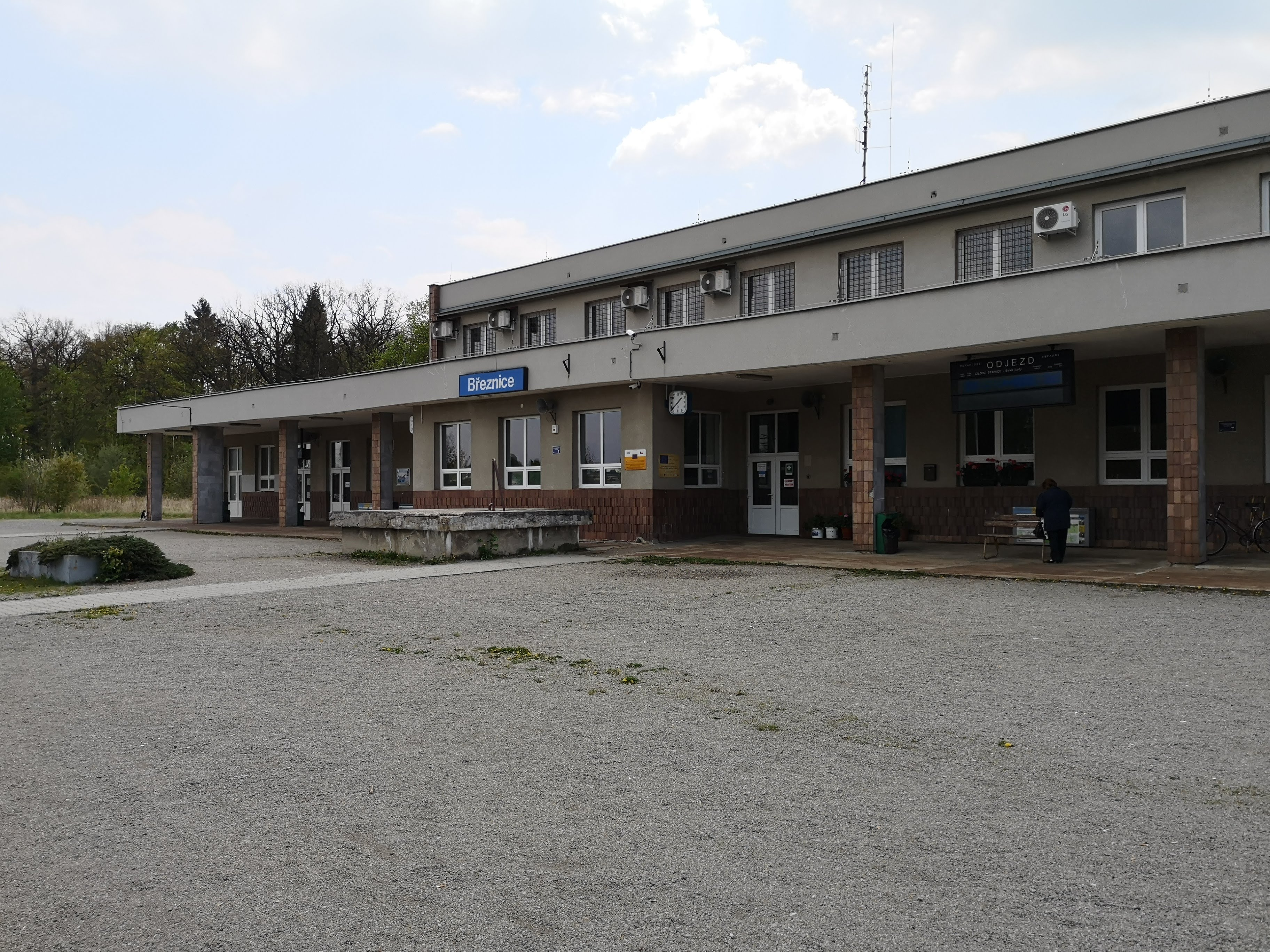 Nádražní budova v Březnici